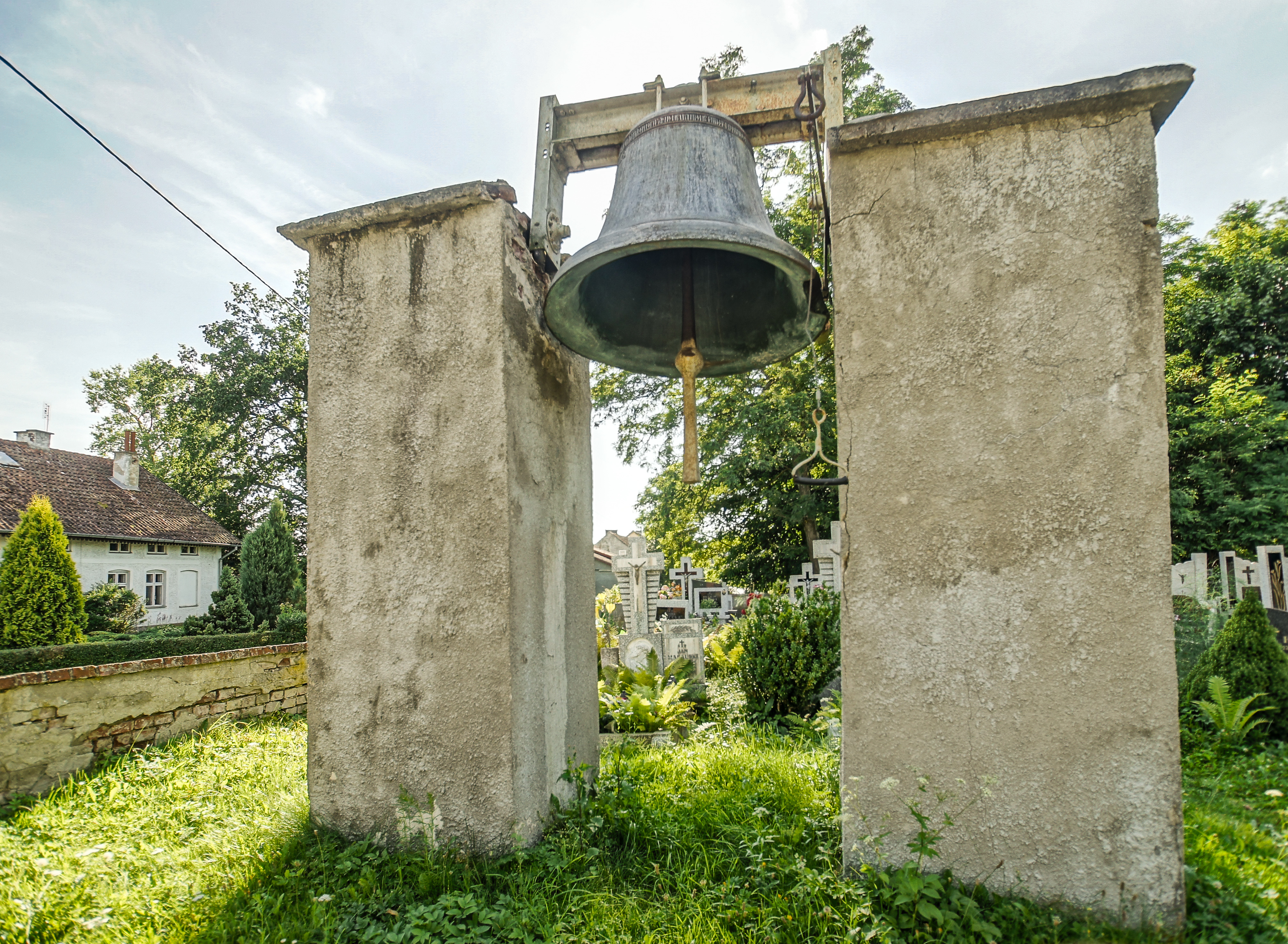 Dzwonnica przy kościele p.w. św. Katarzyny w Henrykowie, pow. lidzbarski.